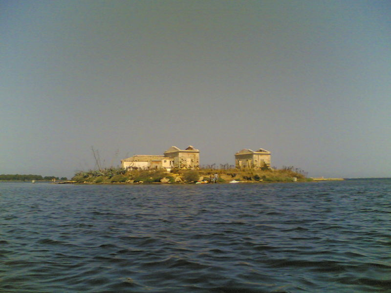 Scattata il 24/06/2006 con il Nokia 6630